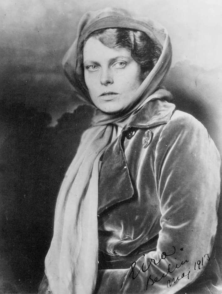 Eira Hellberg, journalist